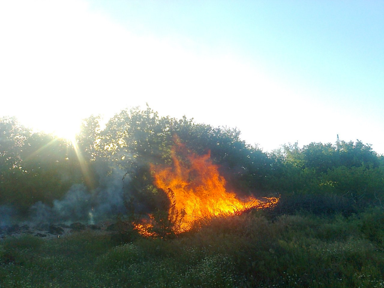 В садах Филибера. Мелитополь